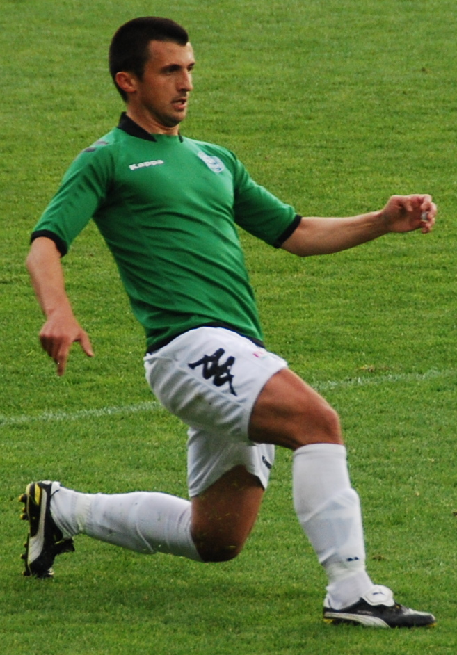 Fodboldspilleren Eldin Karisik fra Viborg FF. Her i 1. divisionskampen mod Kolding FC på Viborg Stadion.